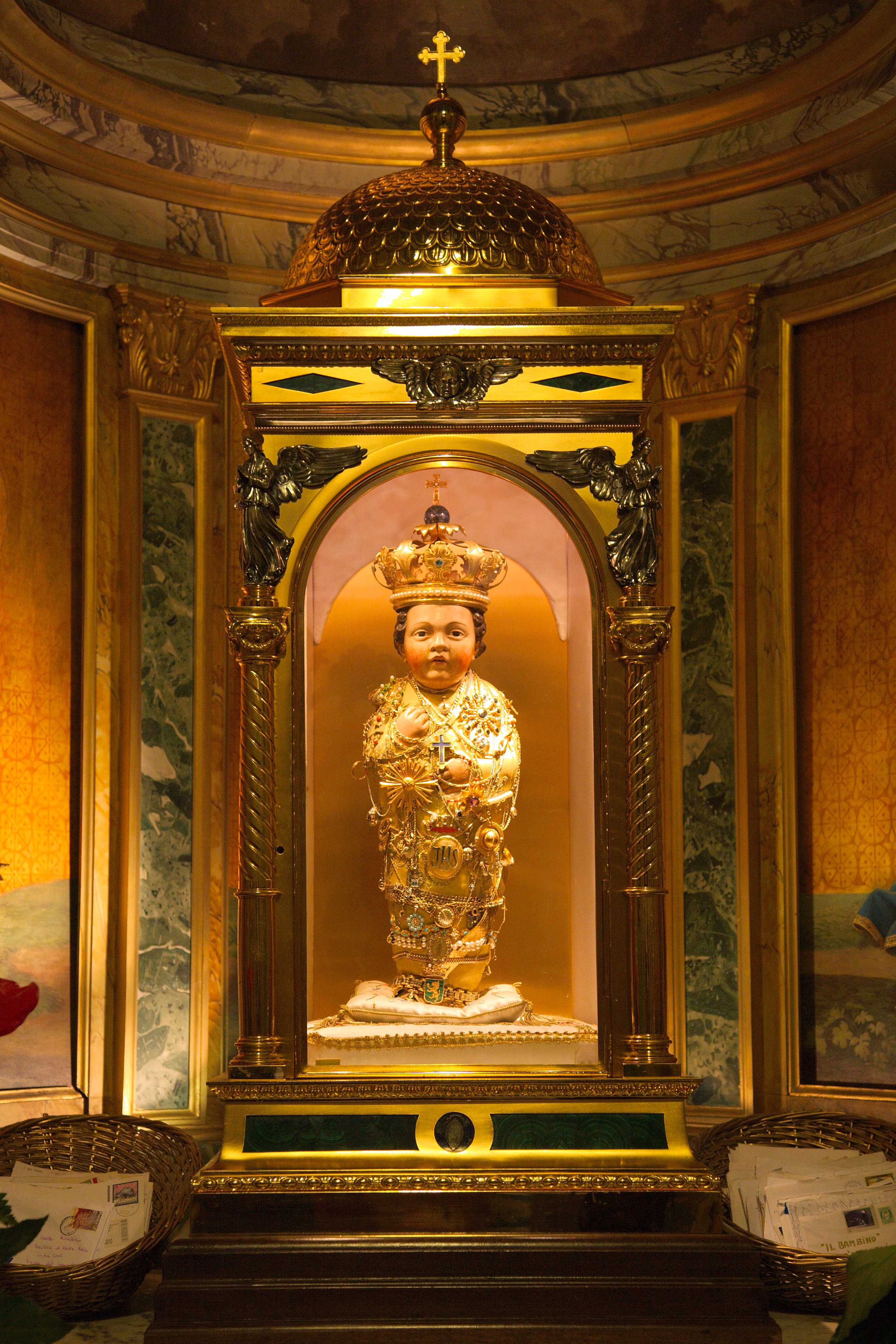 Roma, santa Maria in Aracoeli, il Bambinello (copia. L'originale fu rubato nel febbraio 1994)